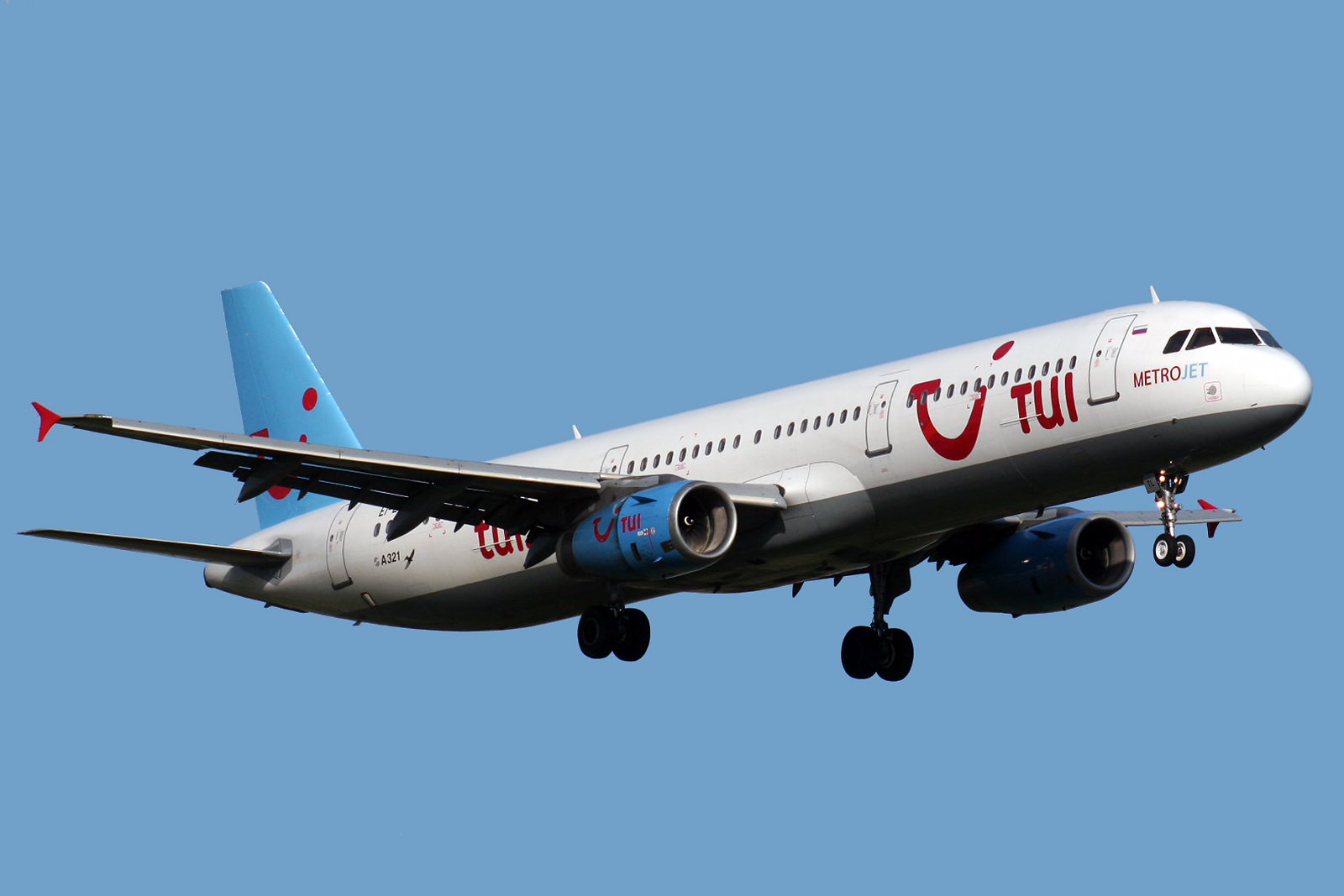 Barcelona El Prat (LEBL/BCN) Airport